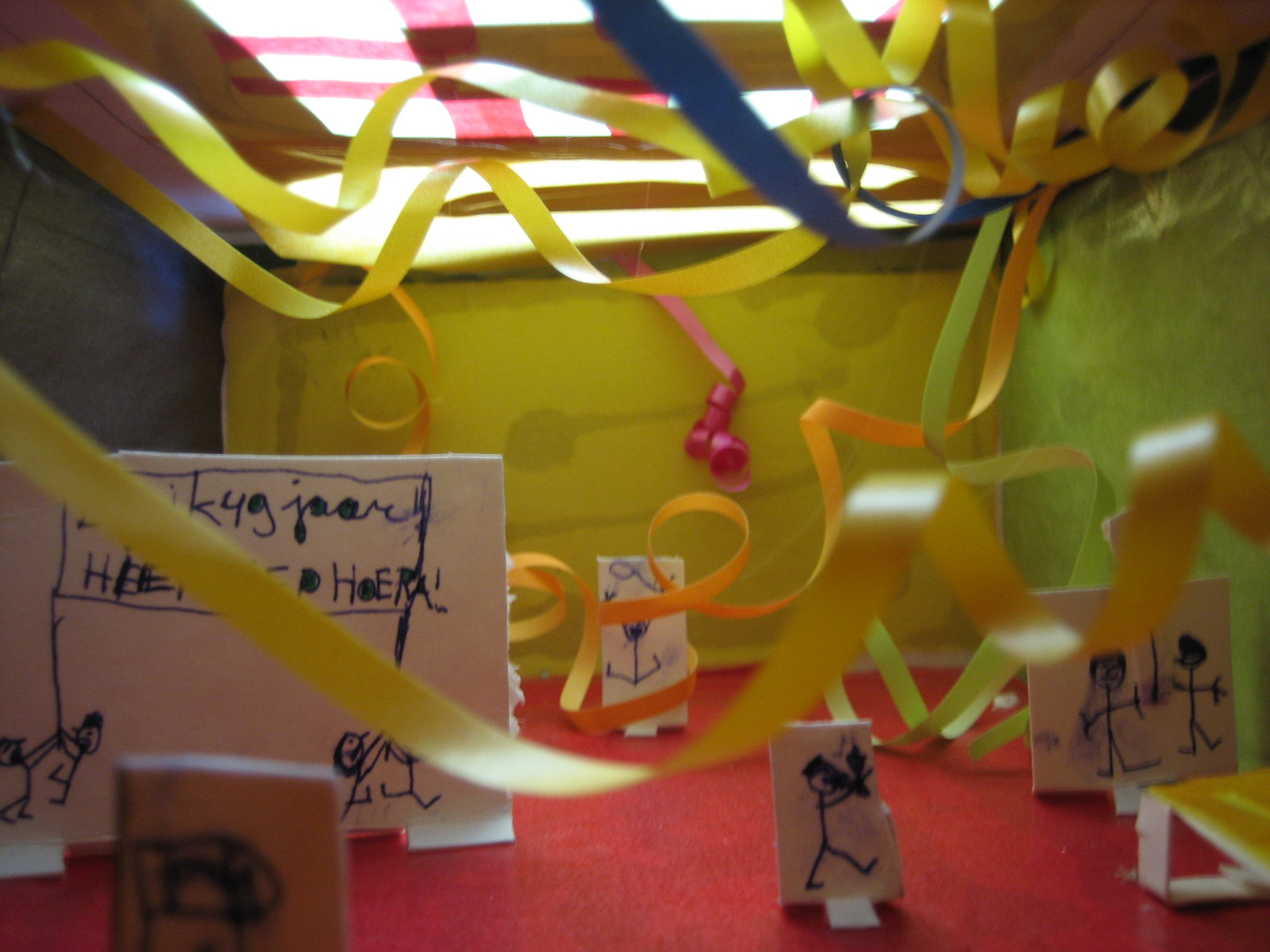 Kijkdoos (interieur) ter gelegenheid van een verjaardag